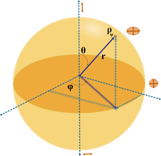 தளவிளைவுற்ற மற்றும் தளவிளைவுறா ஒளியினைக் குறிக்க உதவும் கோளம், θ {\displaystyle \theta } , ϕ {\displaystyle \phi } கோணங்கள், தளவிளைவின் வடிவத் தன்மையினைக் (கிடைமட்ட, நேர்குத்து, வட்டவடிவ, நீள்வட்டவடிவ ) குறிப்பன. r {\displaystyle r} தளவிளைவின் அளவைப் (எ.கா. சூரிய ஒளி போன்ற தளவிளைவுறாத ஒளியினை கோளத்தின் மையப்புள்ளியில், r = 0 {\displaystyle r=0} , குறிக்கலாம், முழுமையாகத் தளவிளைவுற்றதை, கோளத்தின் மேற்புறத்தில்குறிக்கலாம் ) பொறுத்தன